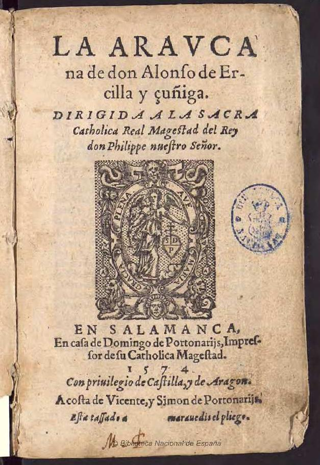 La Araucana de don Alonso de Ercilla y çuñiga ... Autor: Ercilla y Zúñiga, Alonso de (1533-1594) Fecha: 1574 Datos de edición: En Salamanca, en casa de Domingo de Portonarijs ... a costa de Vicente, y Simon de Portonarijs